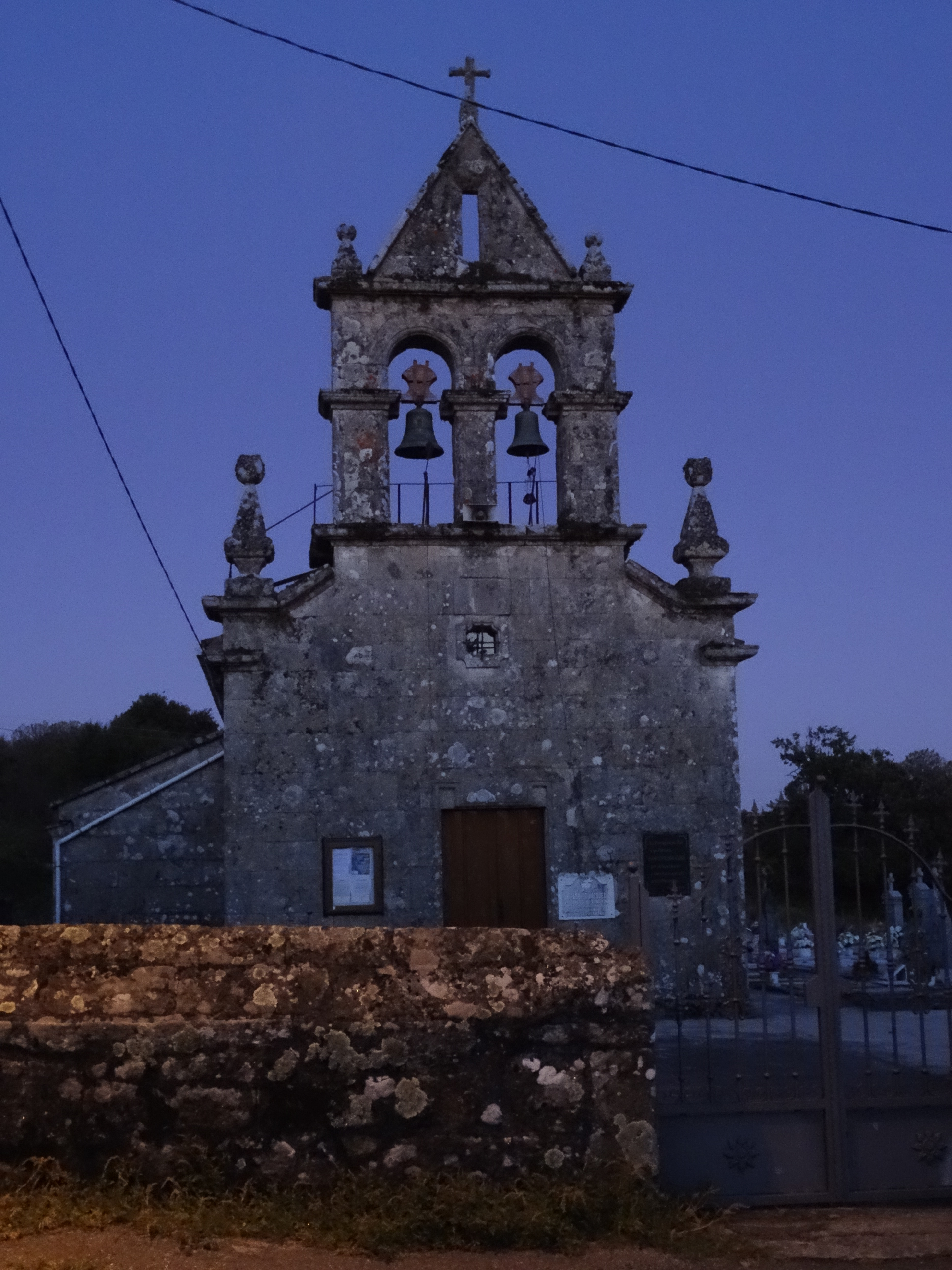 Ver título.